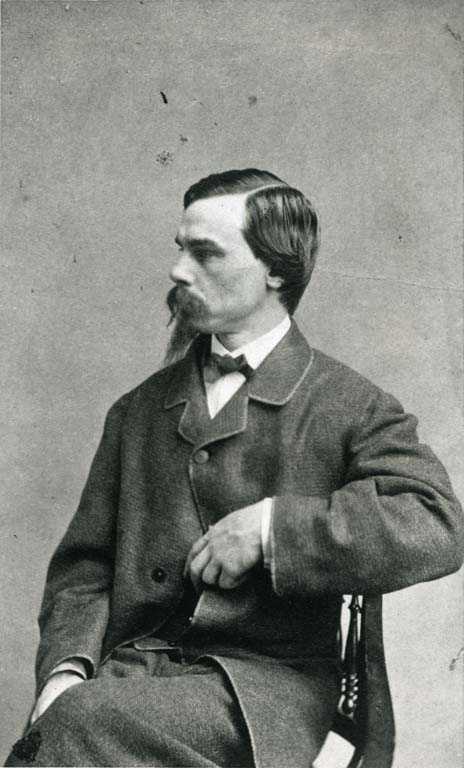 Cliché photographique du peintre Louis Rémy Mignot (1831-1870) vers 1860.